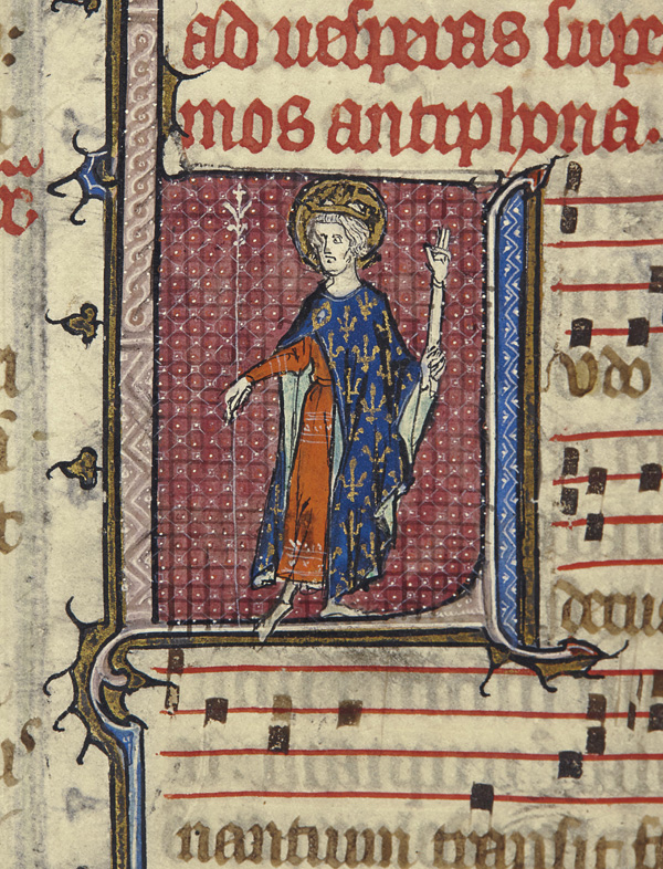 Détail du bréviaire de Saint-Louis de Poissy